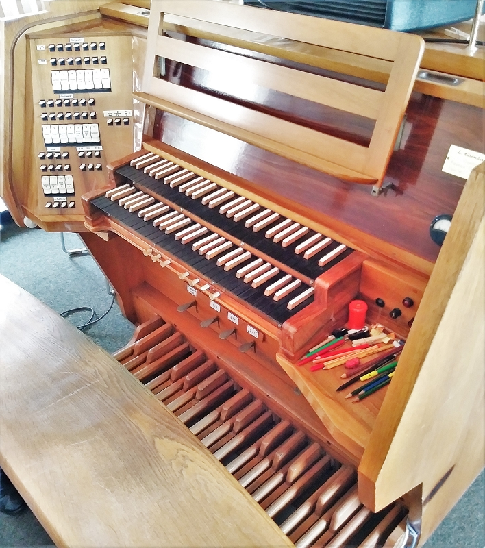 Kirche St. Johann Baptist (Taufkirchen) - interior